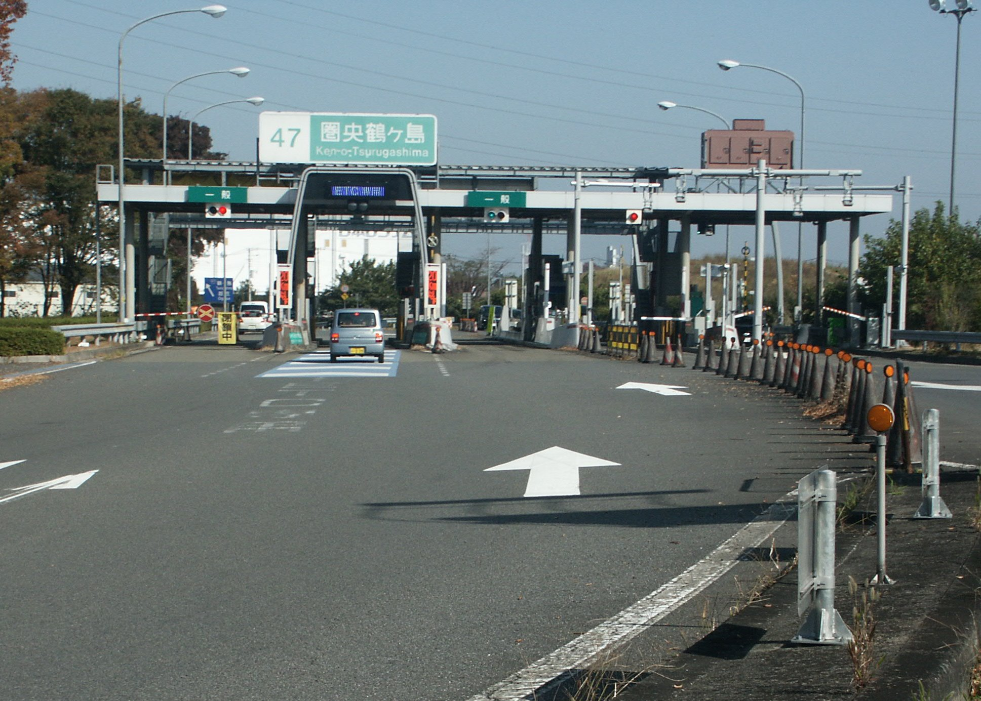 首都圏中央連絡自動車道圏央鶴ヶ島IC料金所